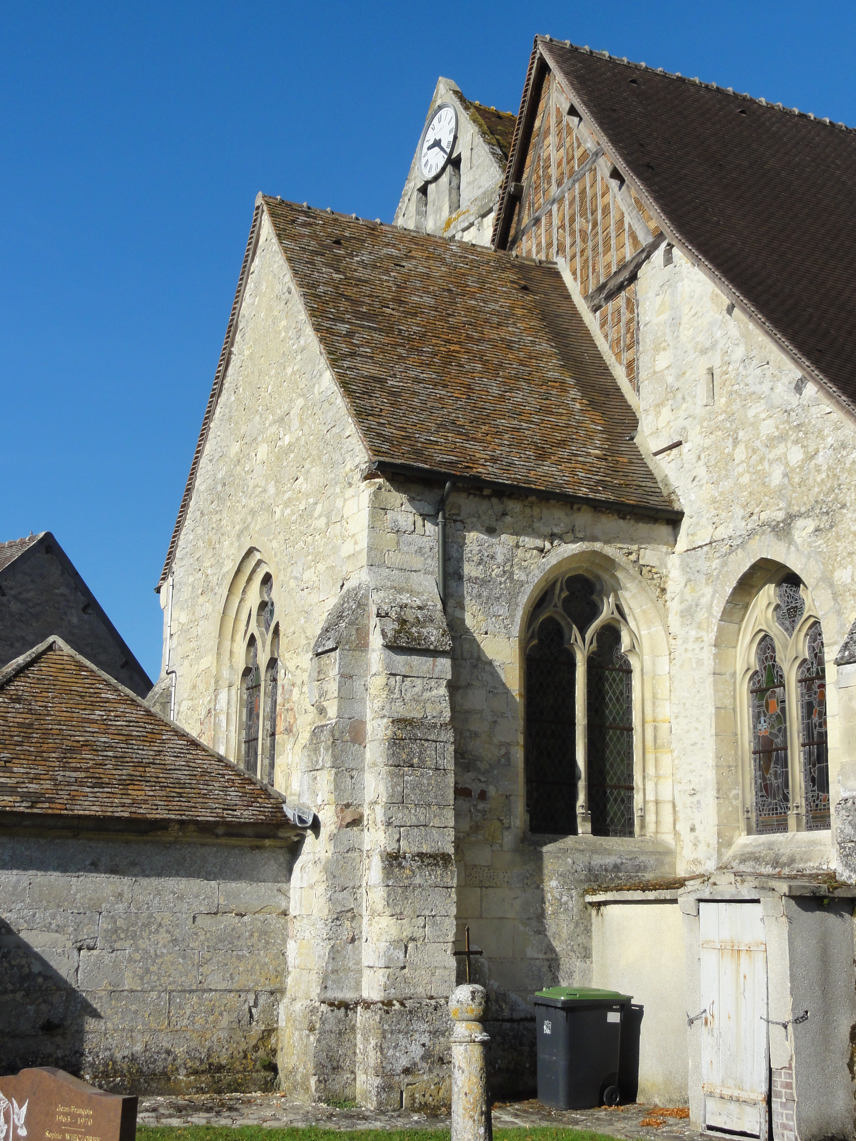 Église Saint-Nicolas de Raray (voir titre).